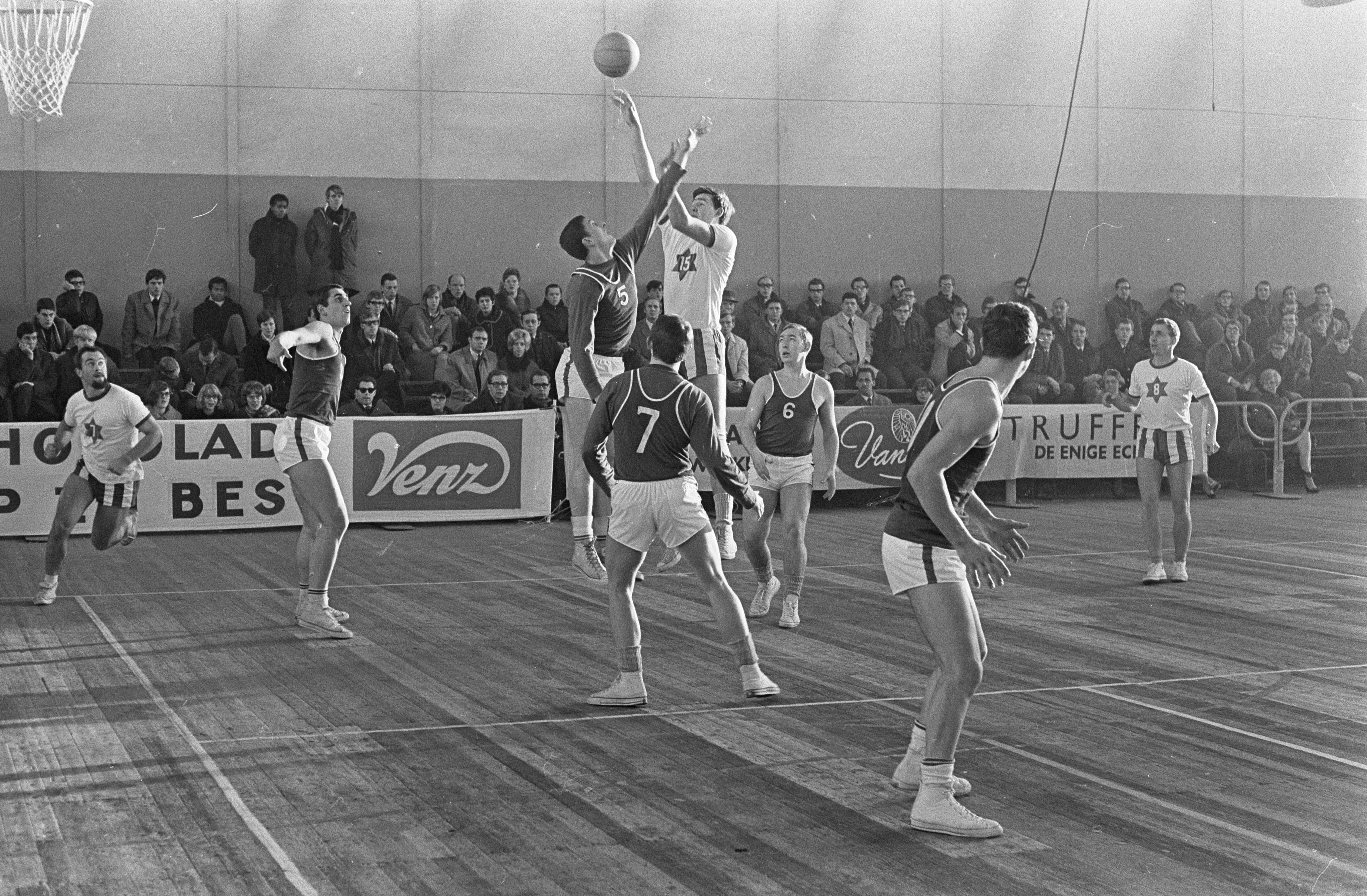 Collectie / Archief : Fotocollectie Anefo Reportage / Serie : [ onbekend ] Beschrijving : Kerstbasketbaltoernooi in Apollohal, spelmoment Pitzenburg (Belgie) en Blue-Stars Datum : 26 december 1966 Locatie : Amsterdam Trefwoorden : basketbal, sport Instellingsnaam : Apollohal Fotograaf : Merk, Ben / Anefo Auteursrechthebbende : Nationaal Archief Materiaalsoort : Negatief (zwart/wit) Nummer archiefinventaris : bekijk toegang 2.24.01.05 Bestanddeelnummer : 919-9112